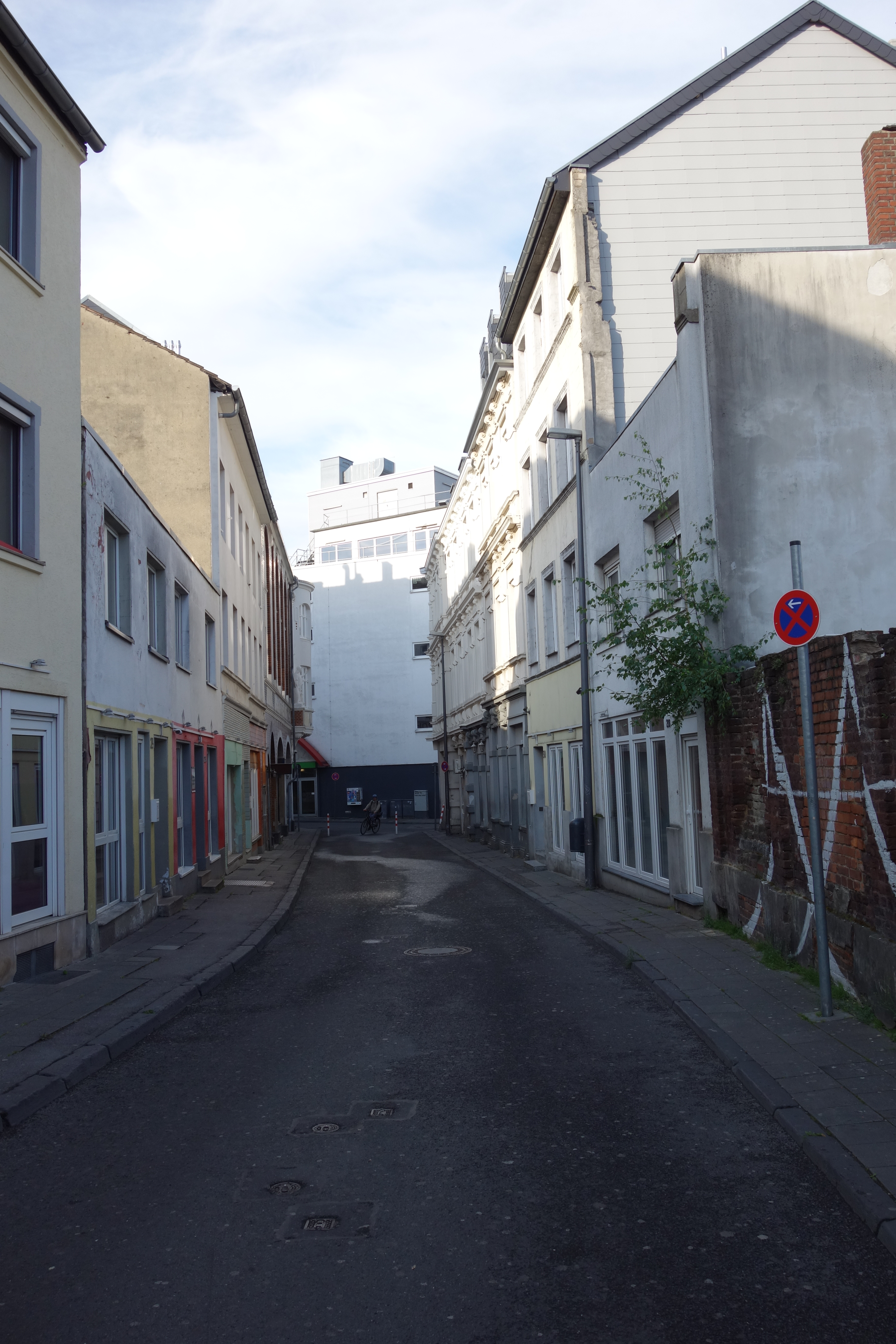 Antoniusstraße, Aachen, geschlossen während Corona-Krise, Blick Richtung Mefferdatisstraße